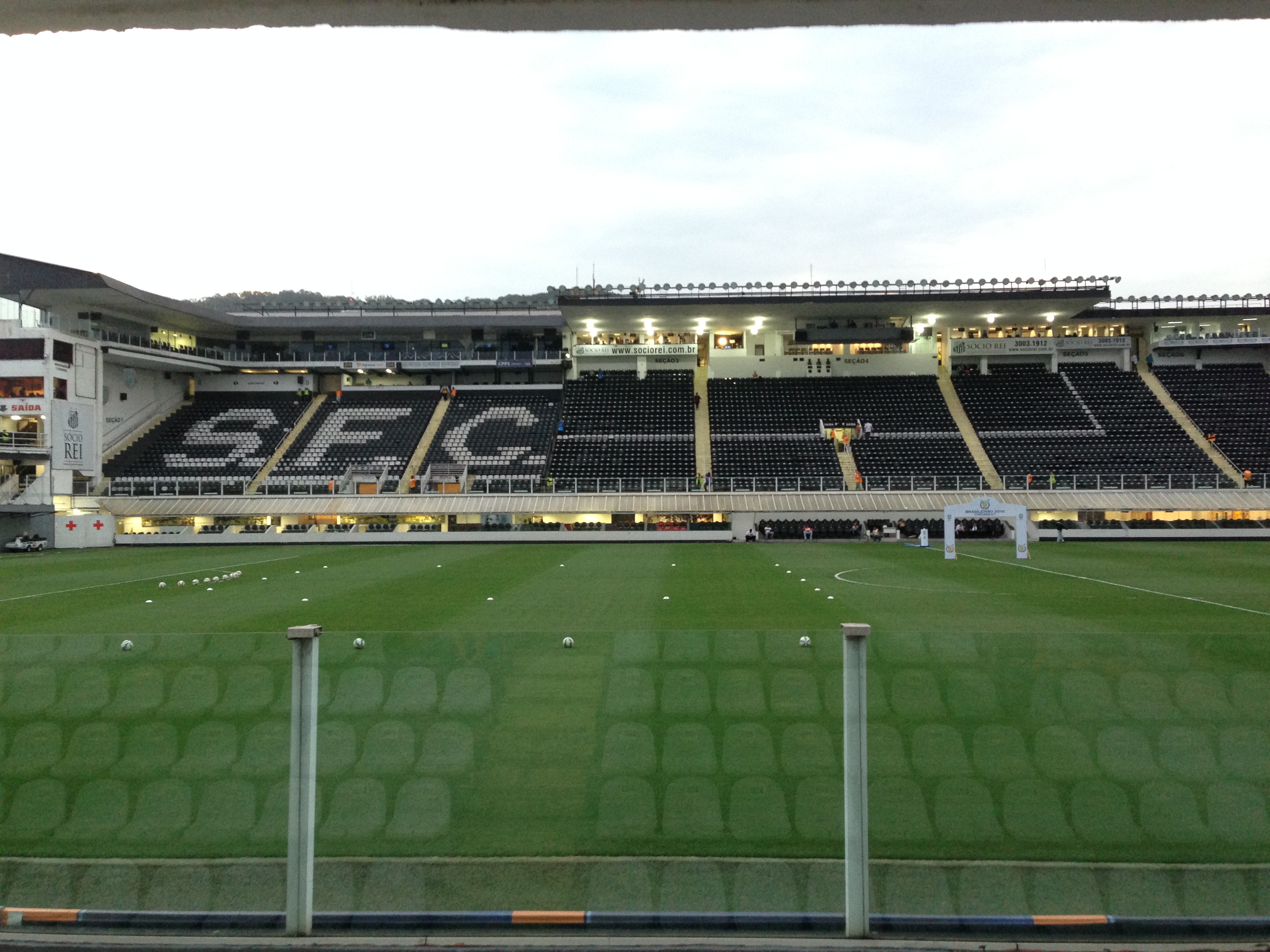 Foto do gramado do Estádio Urbano Caldeira antes da partida entre Santos e Chapecoense pelo Campeonato Brasileiro de 2015